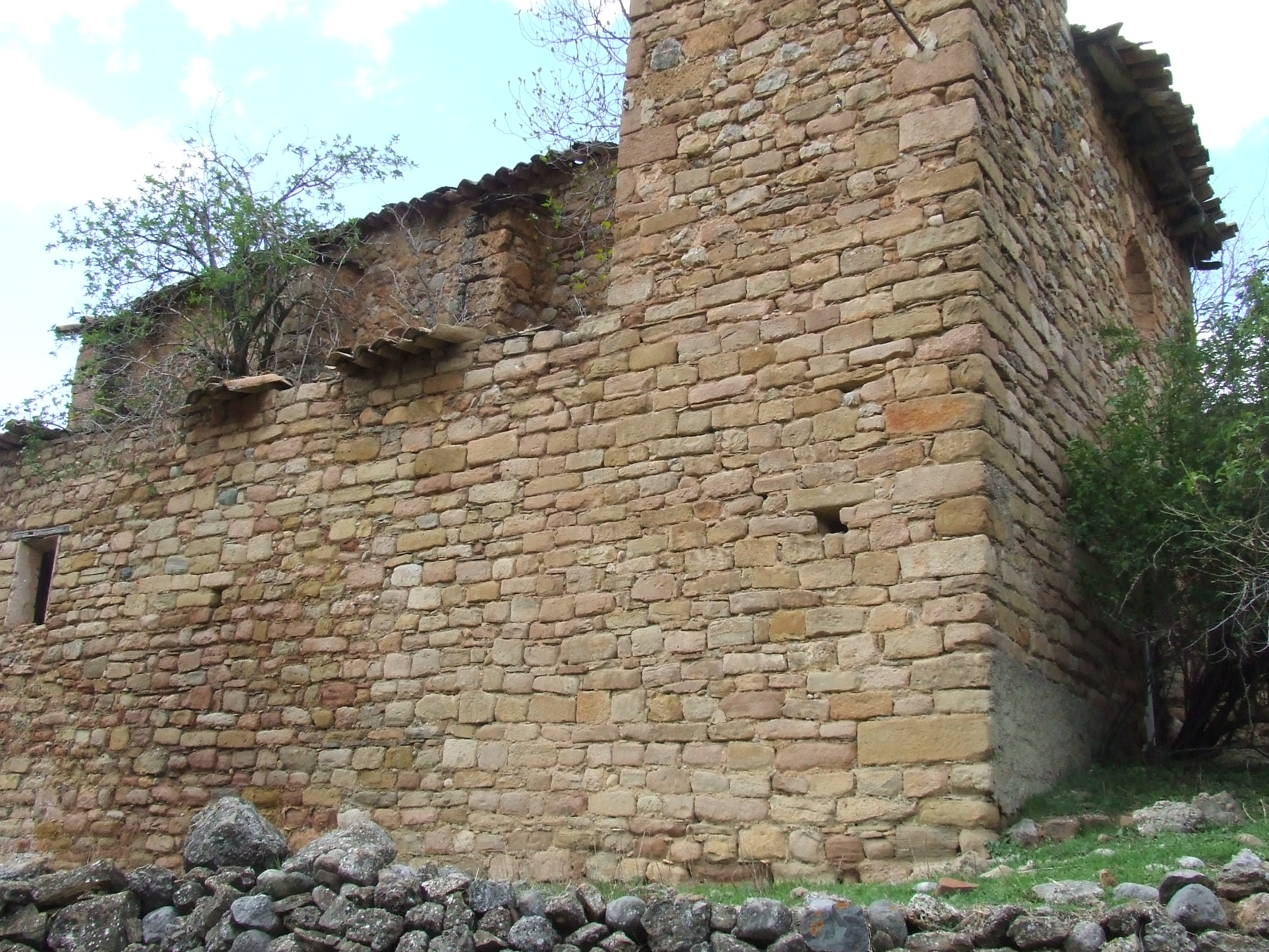 Mur meridional de Sant Esteve d'Esplugafreda, amb filades de carreus possiblement medievals (Sapeira, Tremp, Pallars Jussà)